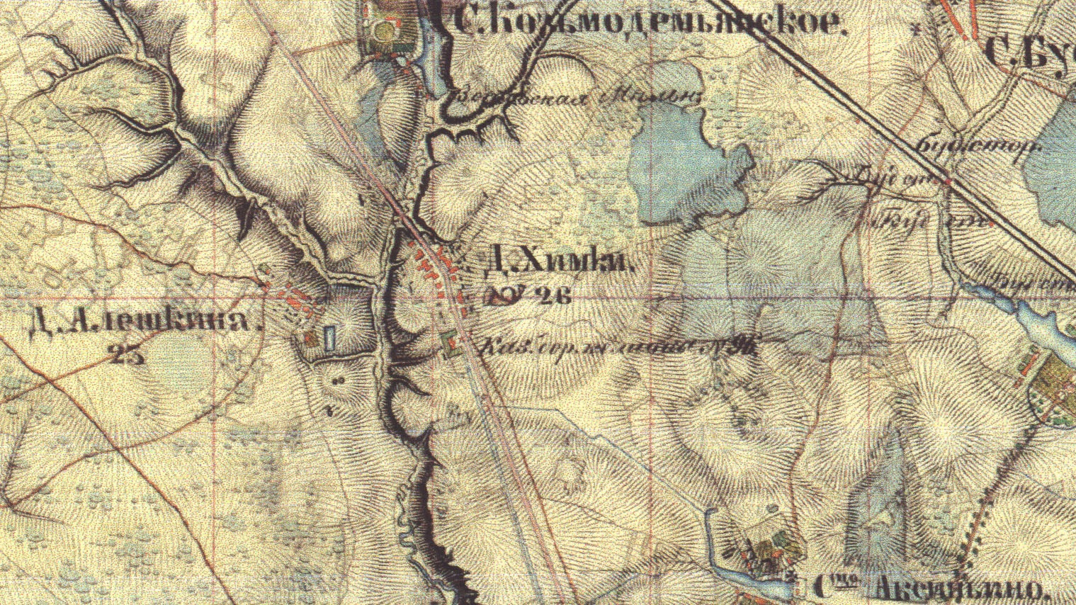 Деревня Химки и окрестности